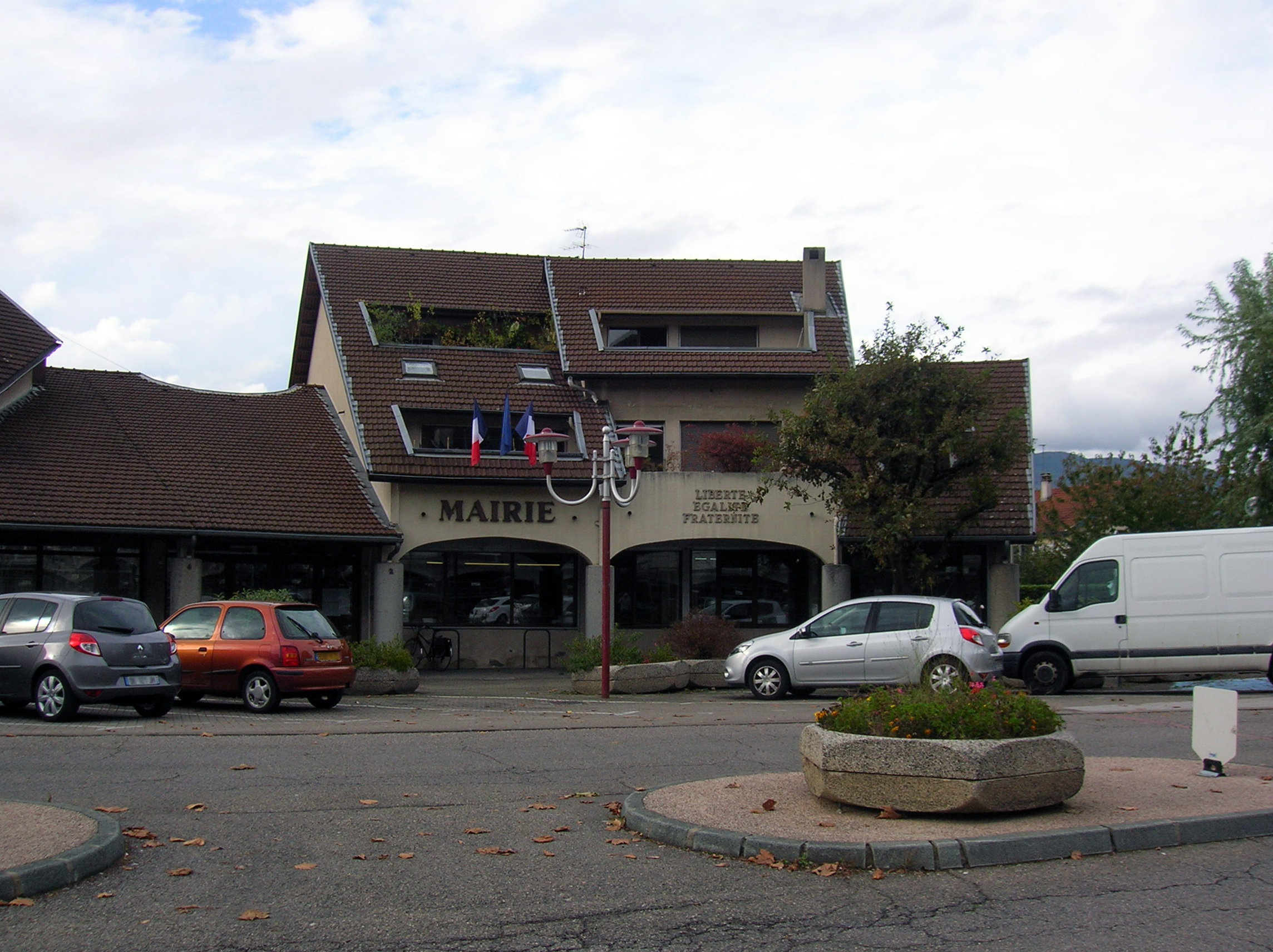 mairie de Poisat, Isère, Rhône-Alpes, France.